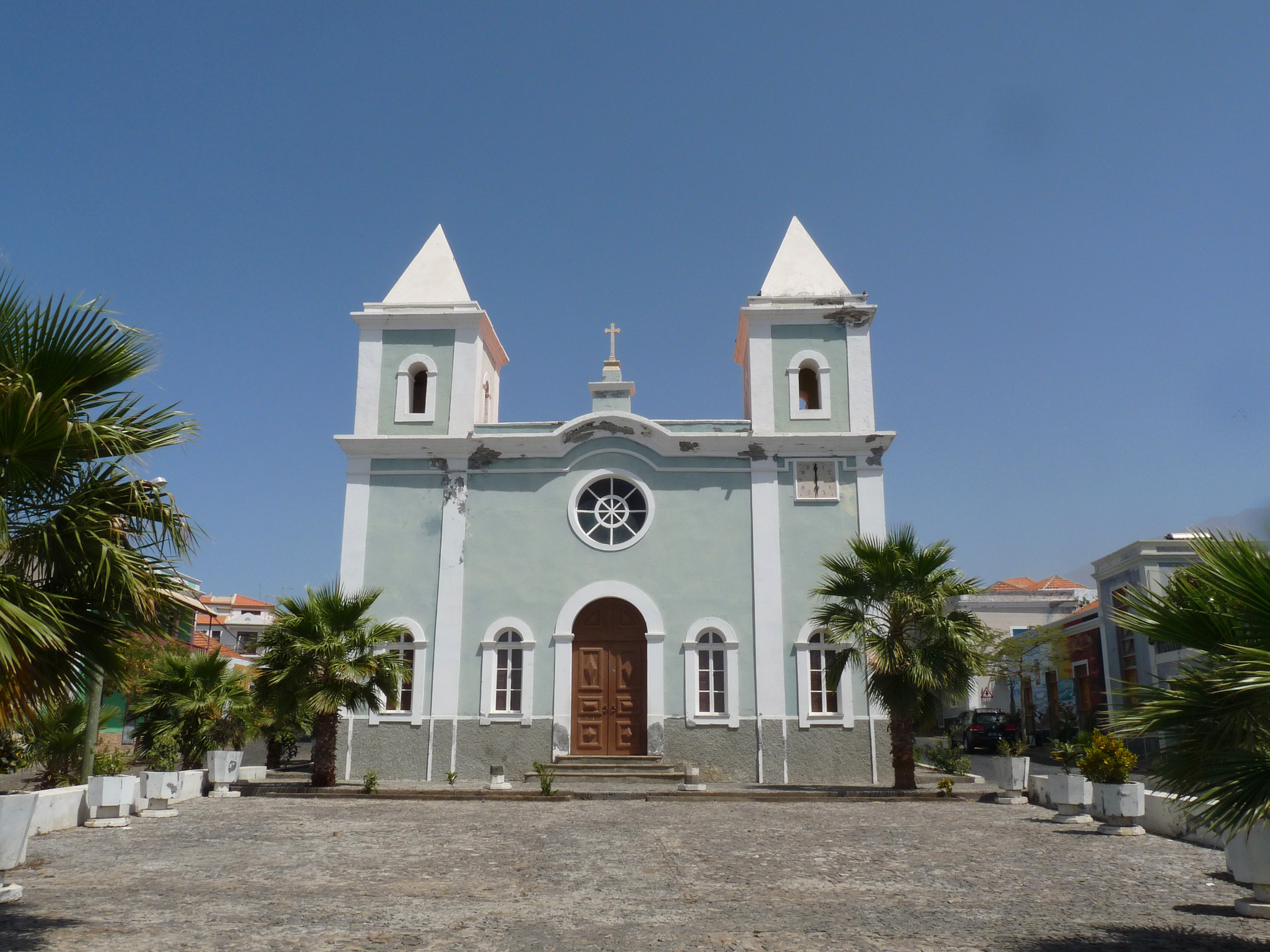 Eglise Nossa Senhora da Conceição à São Filipe (île de Fogo, Cap-Vert)